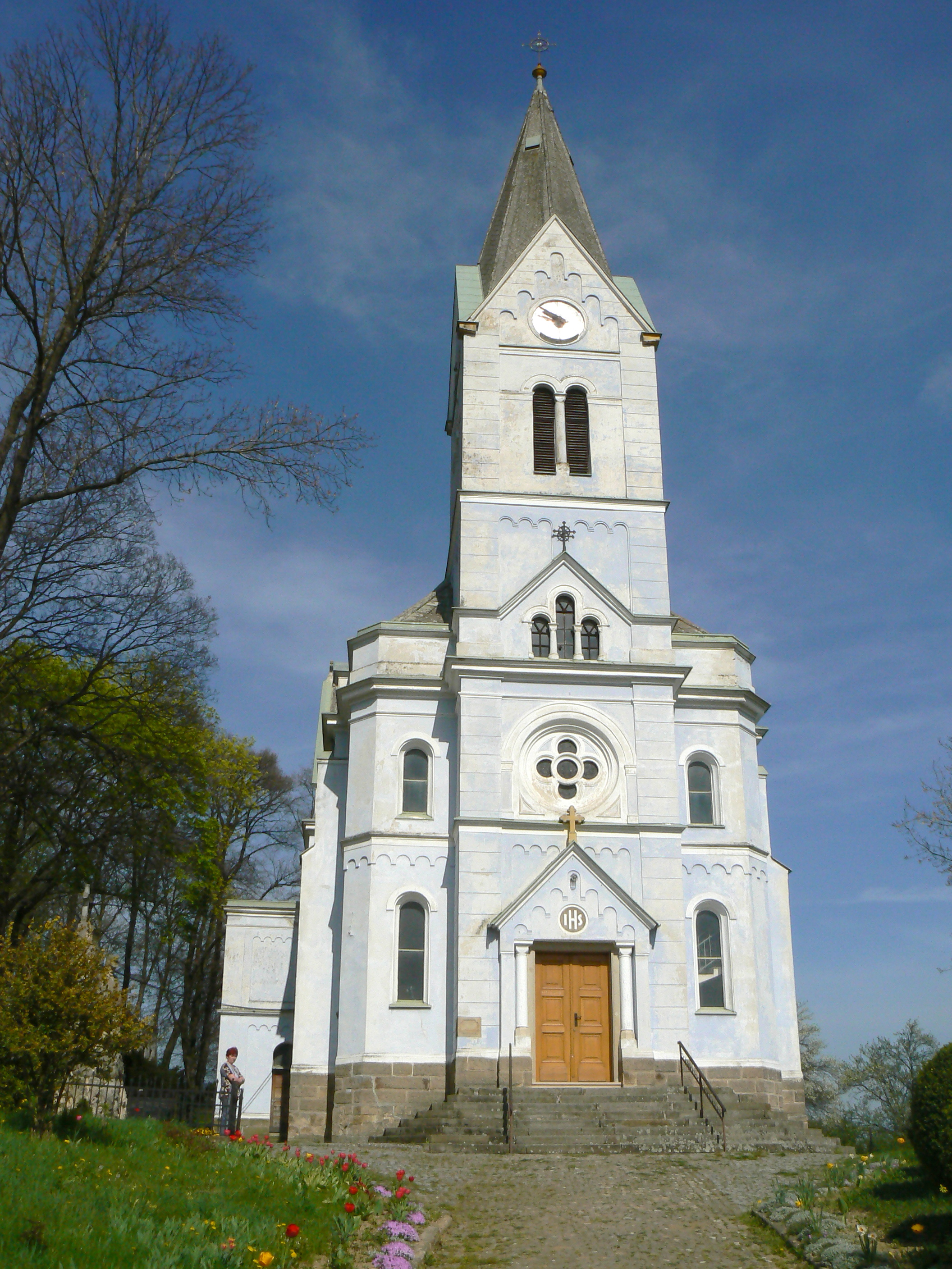 Kostel sv. Prokopa ve Stříbrnicích, okres Uherské Hradiště